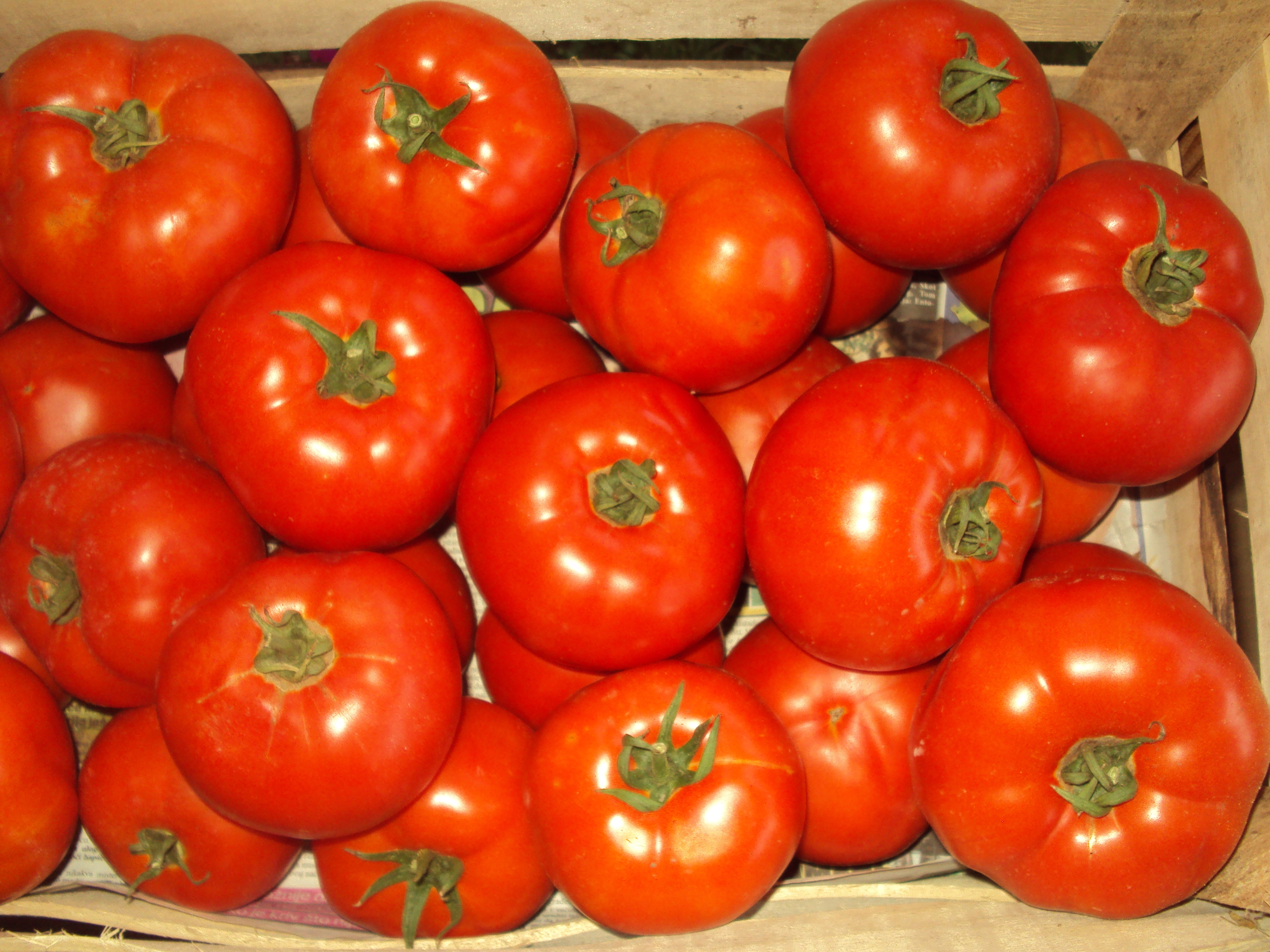 Плод